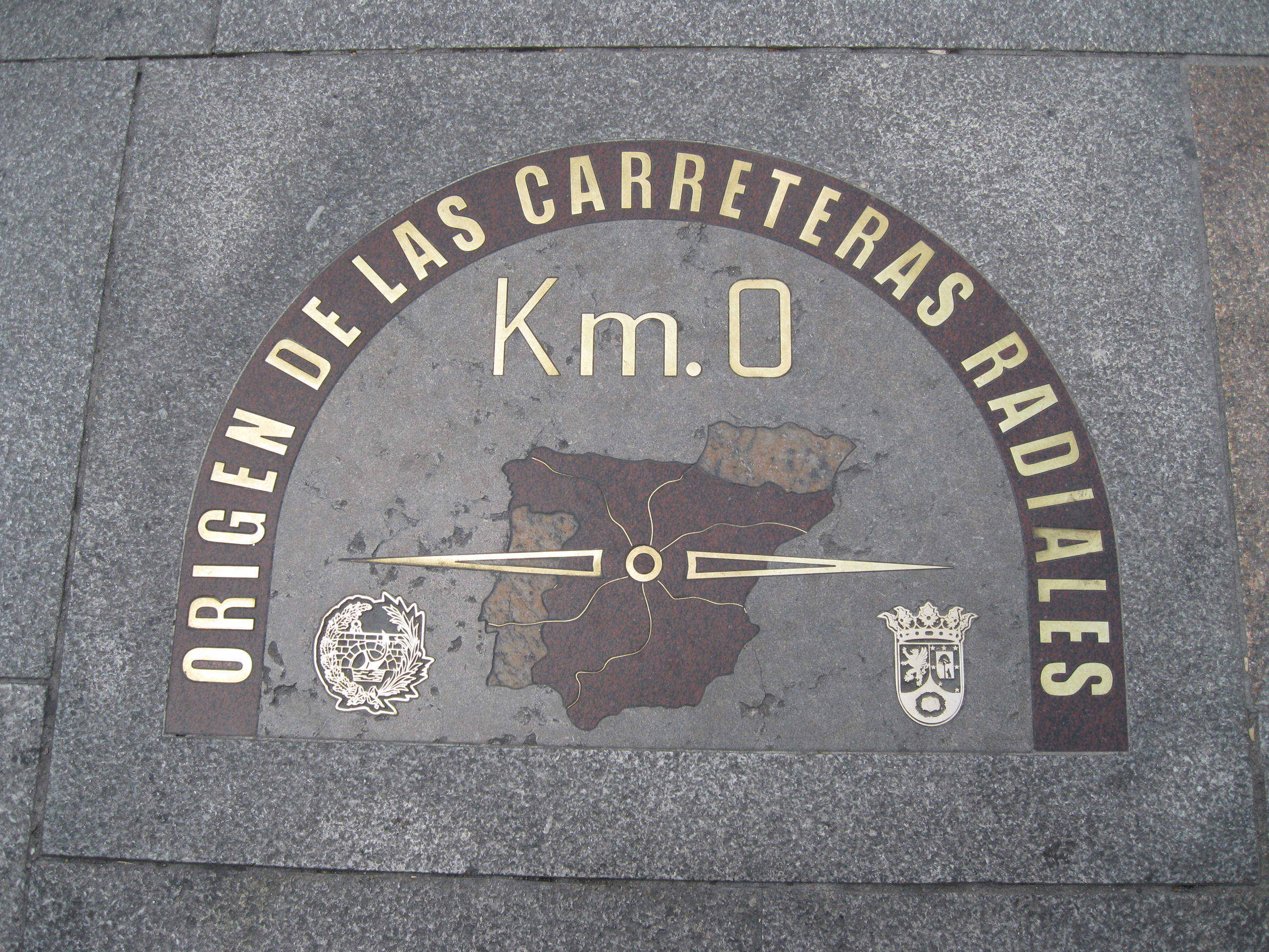 Centro de Madrid-Puerta del Sol.